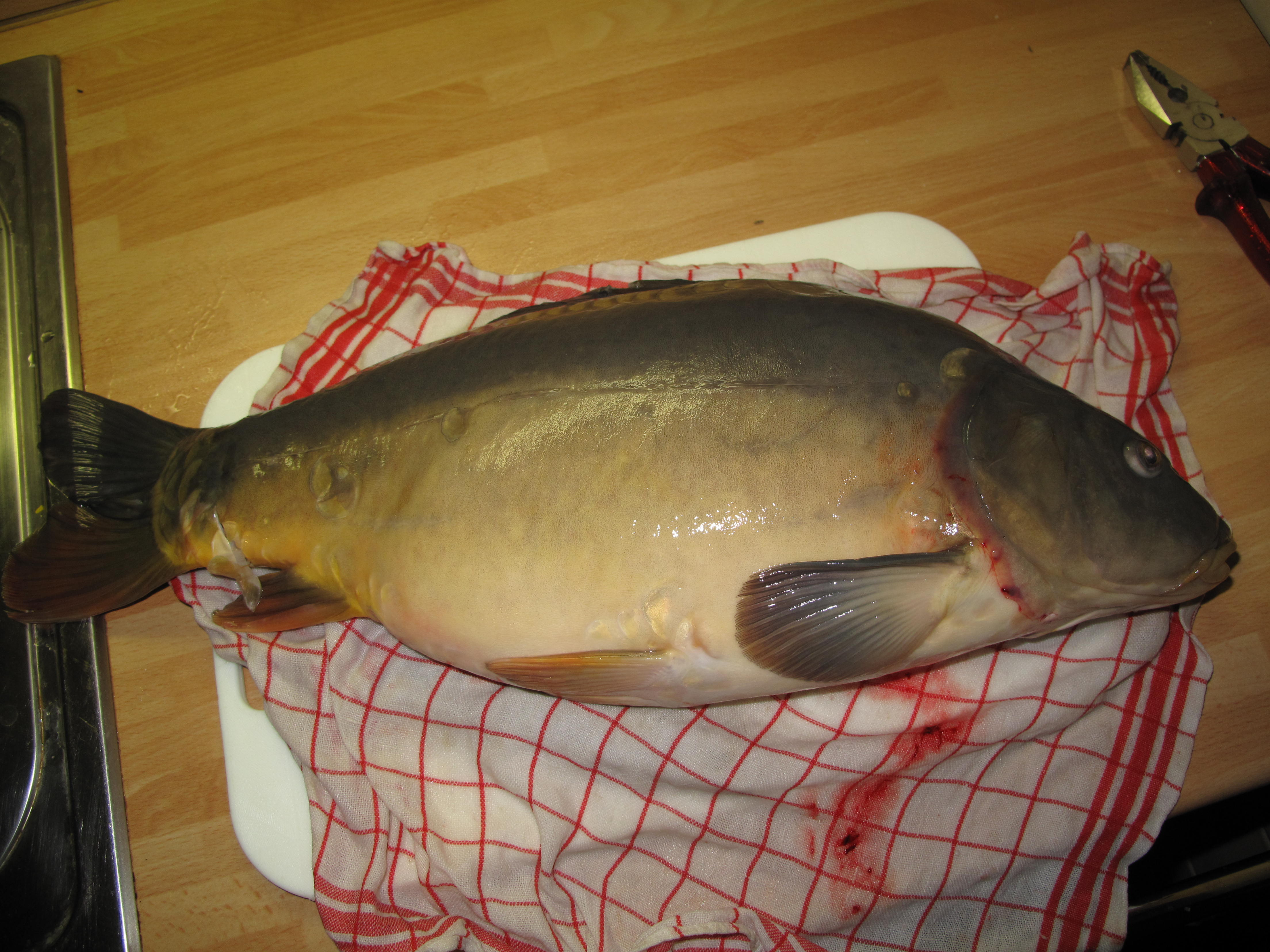 Kapr obecný, 54 cm, 3,25 kg, samice